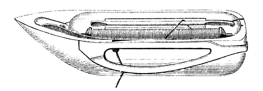 Seitlich offenes Geradlangschiffchen für die Näherei oder die Stickerei